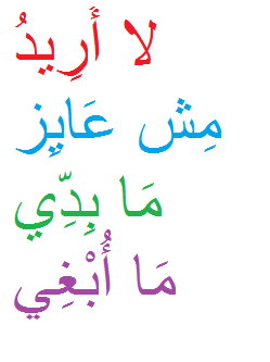 Српски (ћирилица): Пример диглосије у арапском језику.